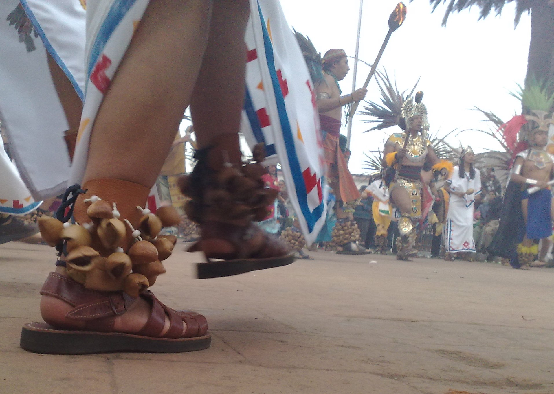 Ceremonia Azteca del Fuego Nuevo en Metepec